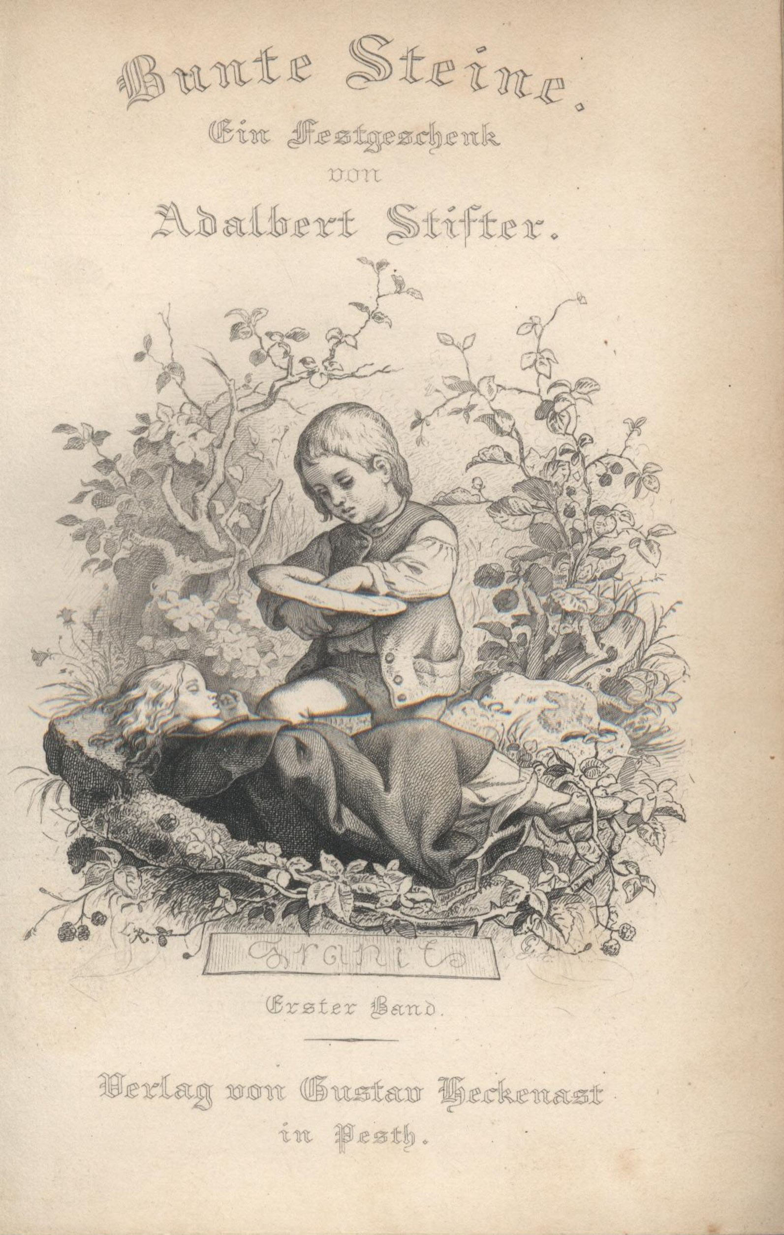 Frontspiz des ersten Bandes von Stifters Bunte Steine. Dargestellt ist eine Szene aus Granit